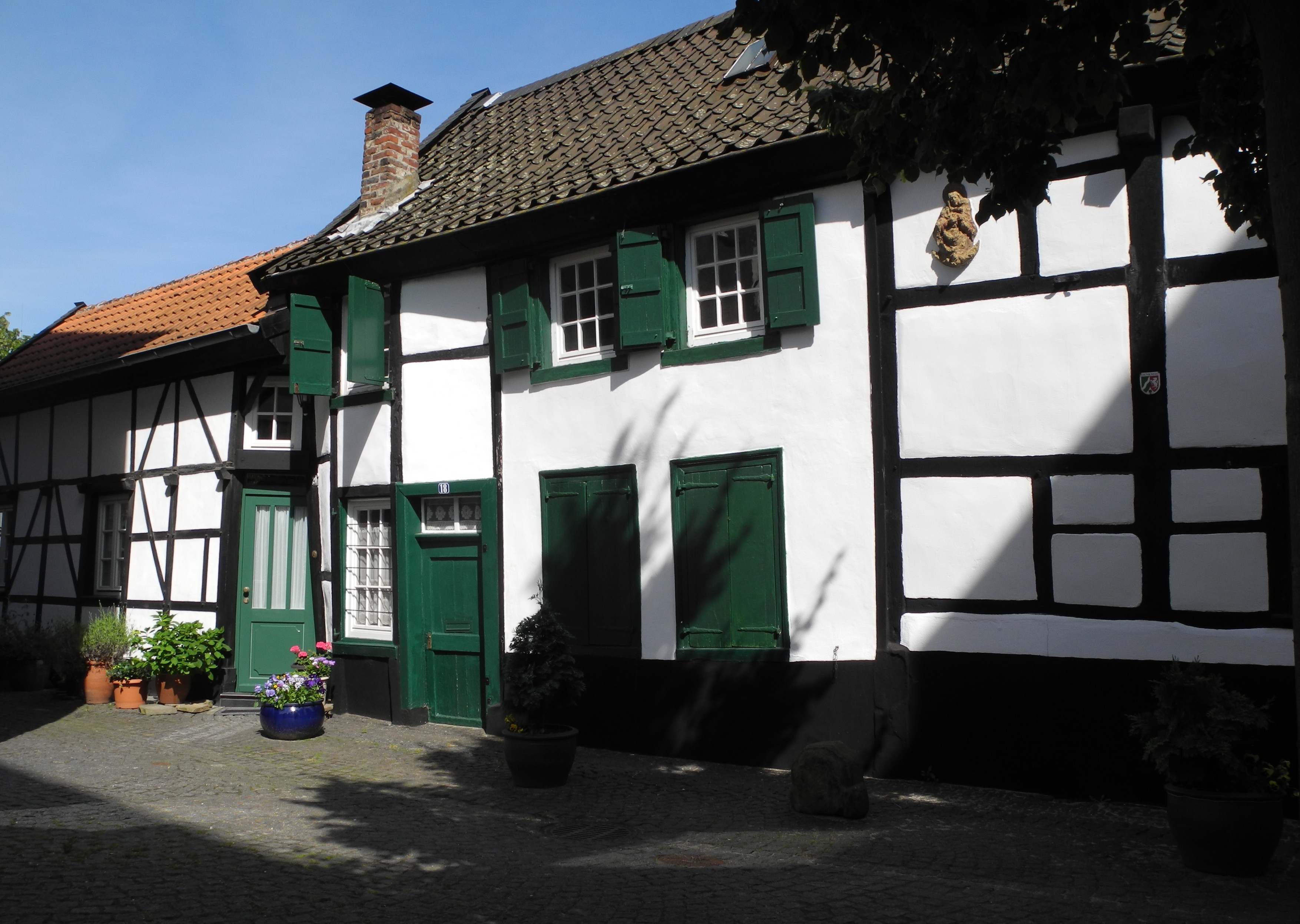 Mülheim an der Ruhr - Fachwerk in der Altstadt